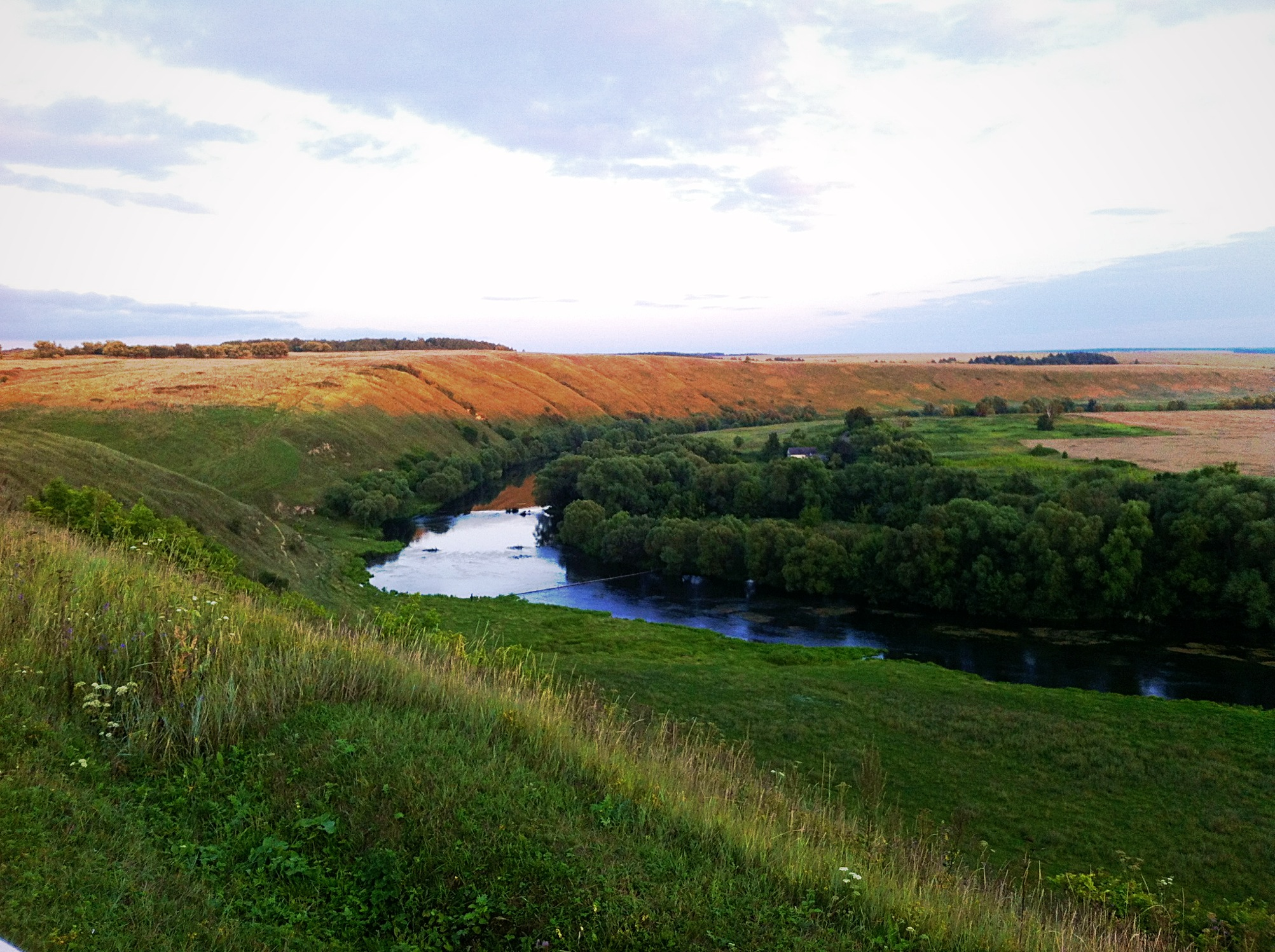 Смотровая ,на Вяжескх холмах